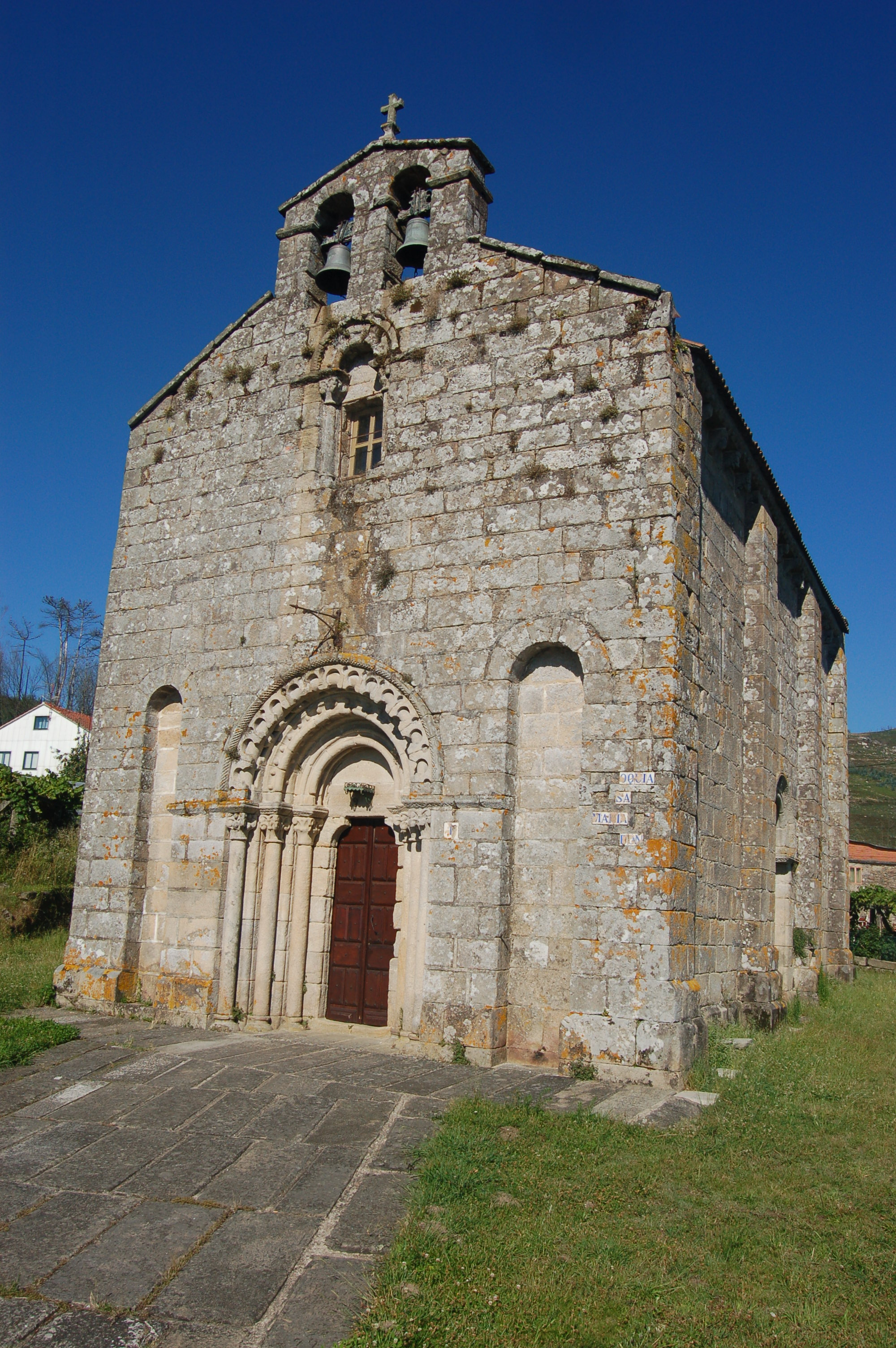 Igrexa parroquial de Santa María de Herbón (Padrón)